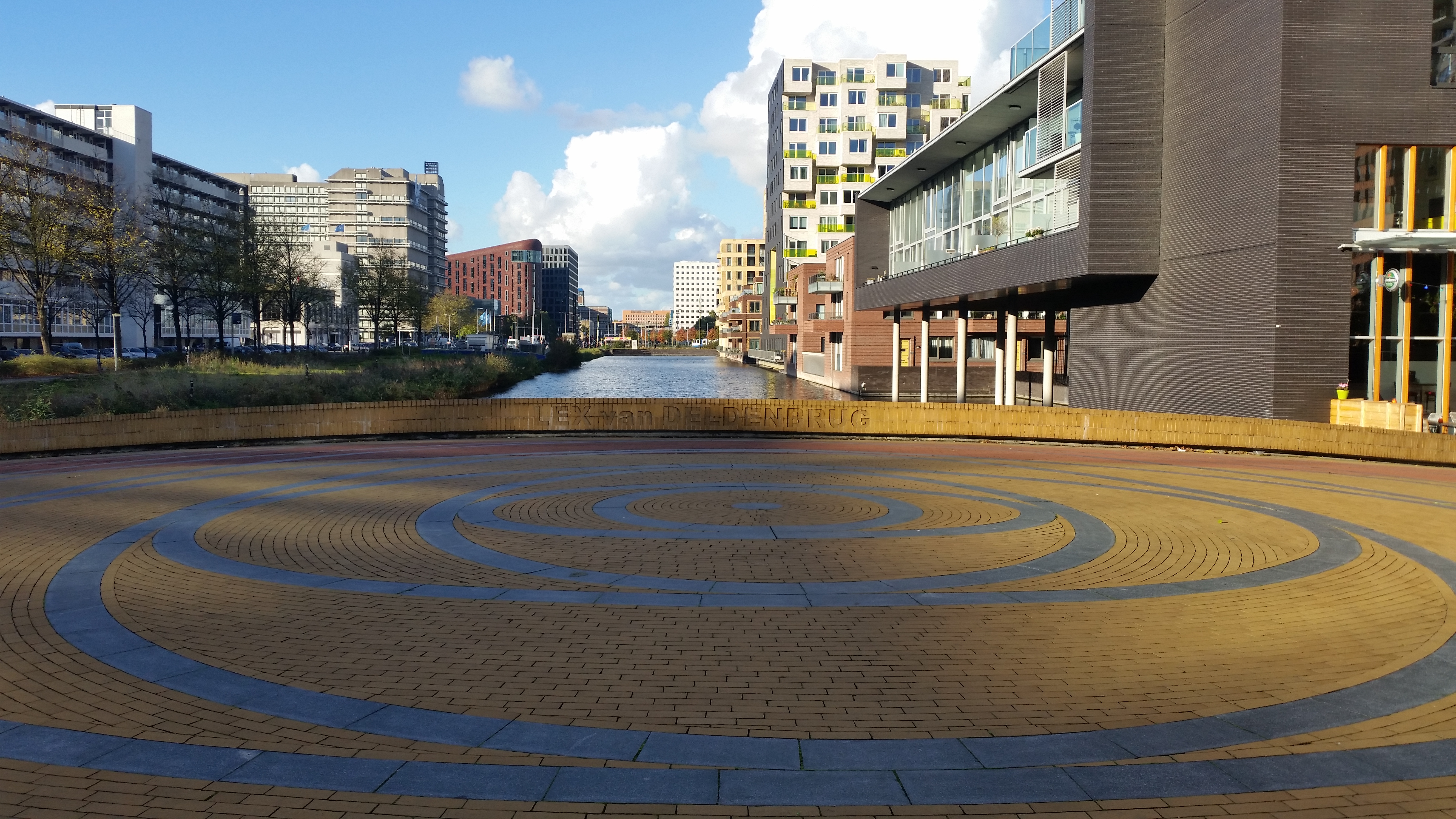 Uitzicht op De Boelegracht vanaf de Lex van Deldenbrug, Amsterdam-Zuid